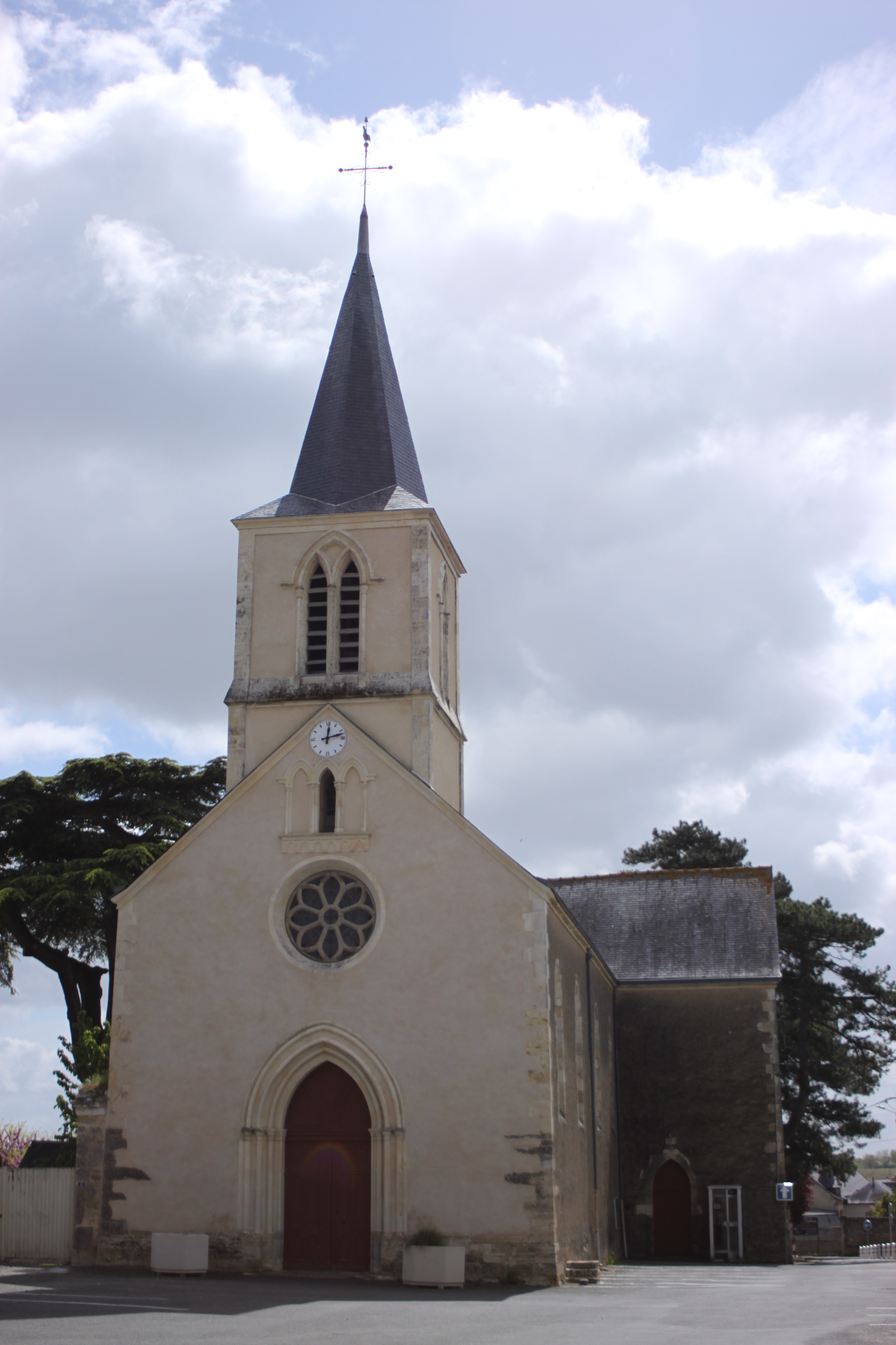 Église de Mâchelles, Fr-49-Faveraye-Mâchelles.